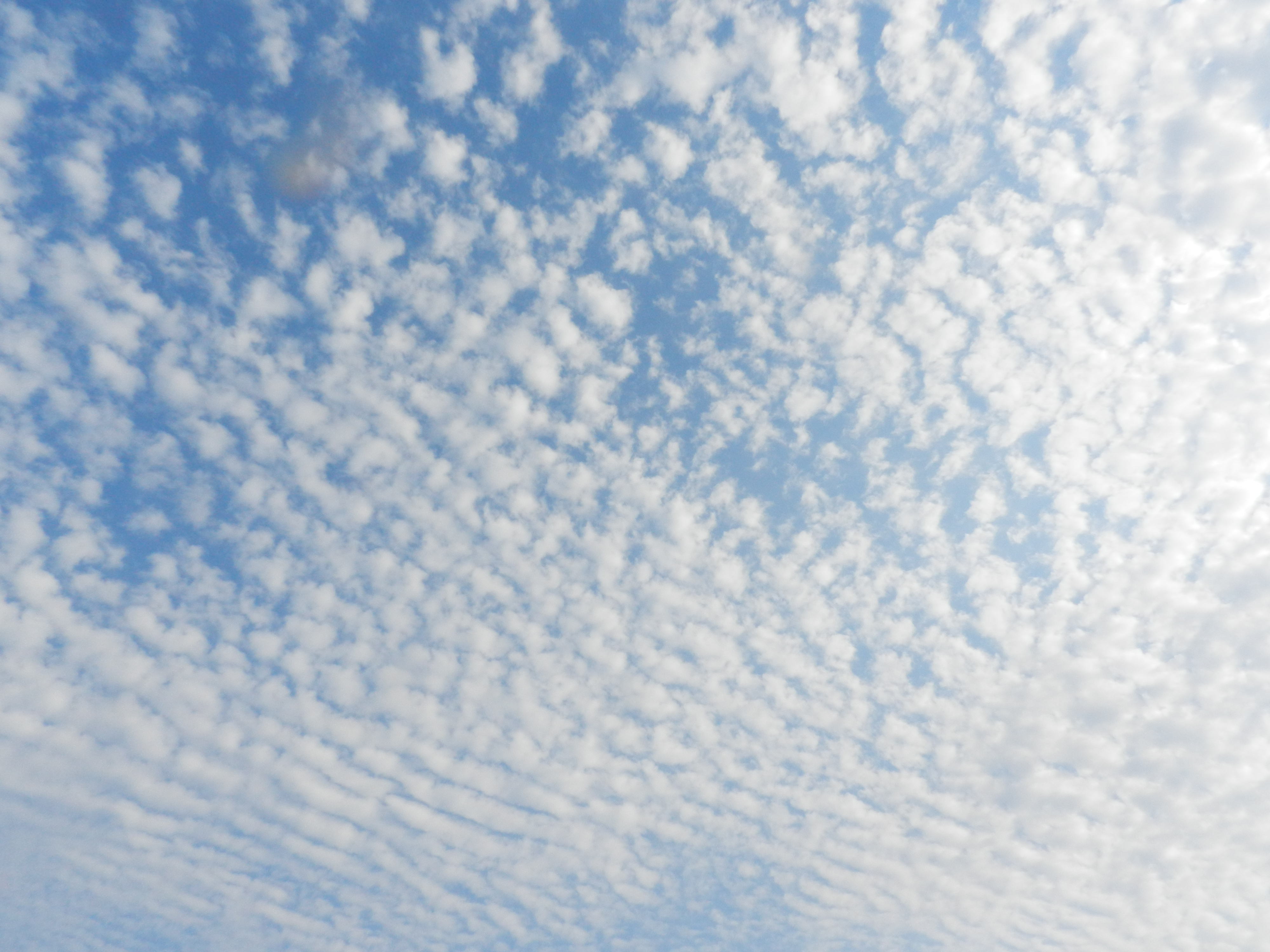 १४ एप्रिल २०१९ ला पुण्याच्या आकाशातील मध्यराशिमेघ